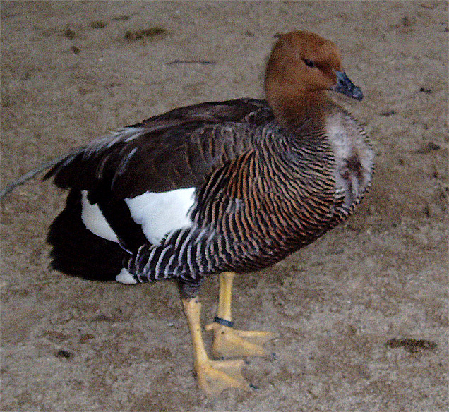 Cauquén o ganso de magallanes (Chloephaga picta) en el zoo de Jerez de la Frontera, España.